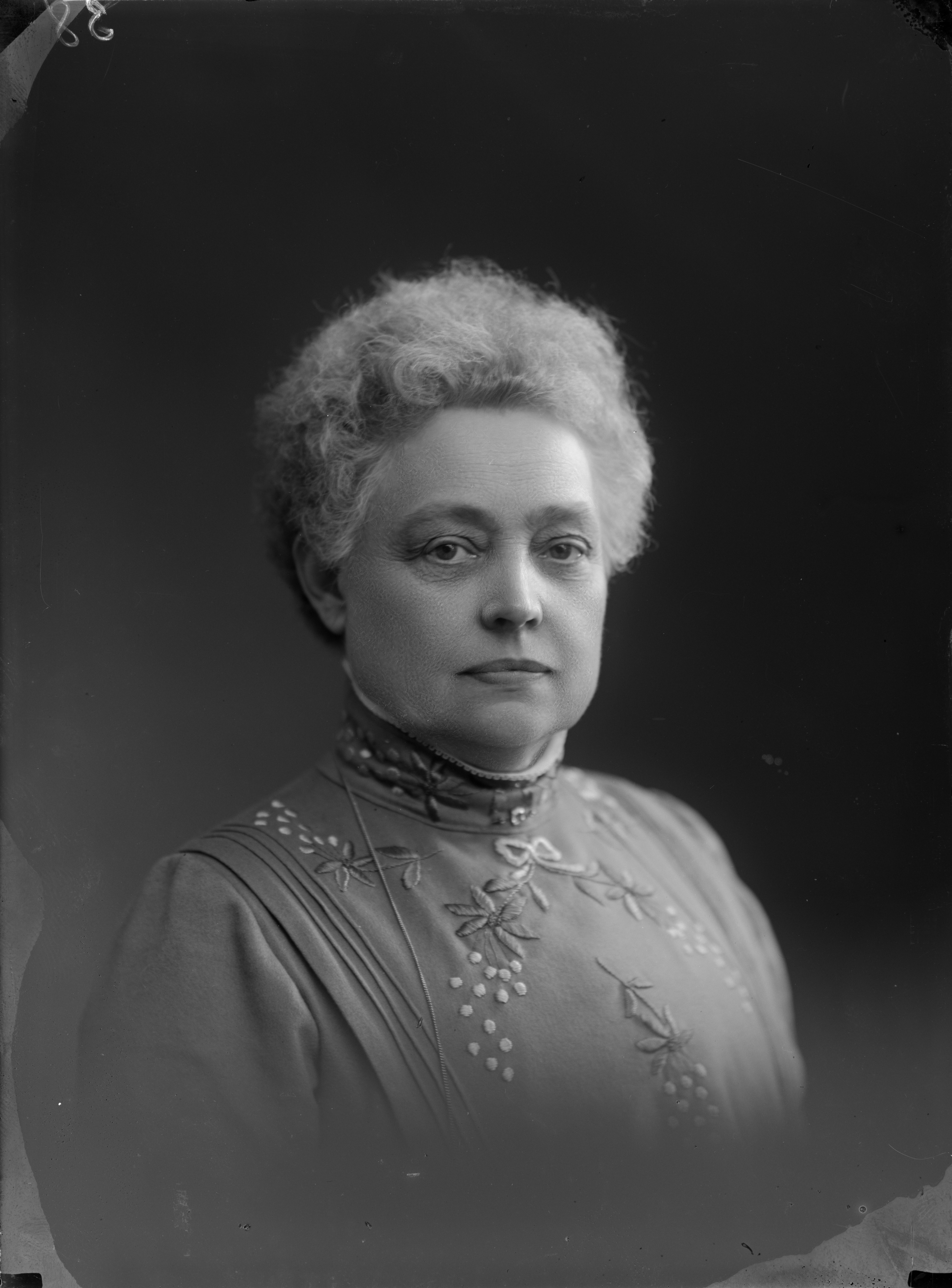 Vera Hjelt